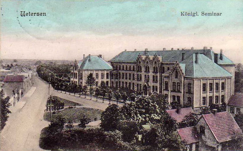 Postkarte, das Königliche Seminar in Uetersen aus dem Jahr 1905